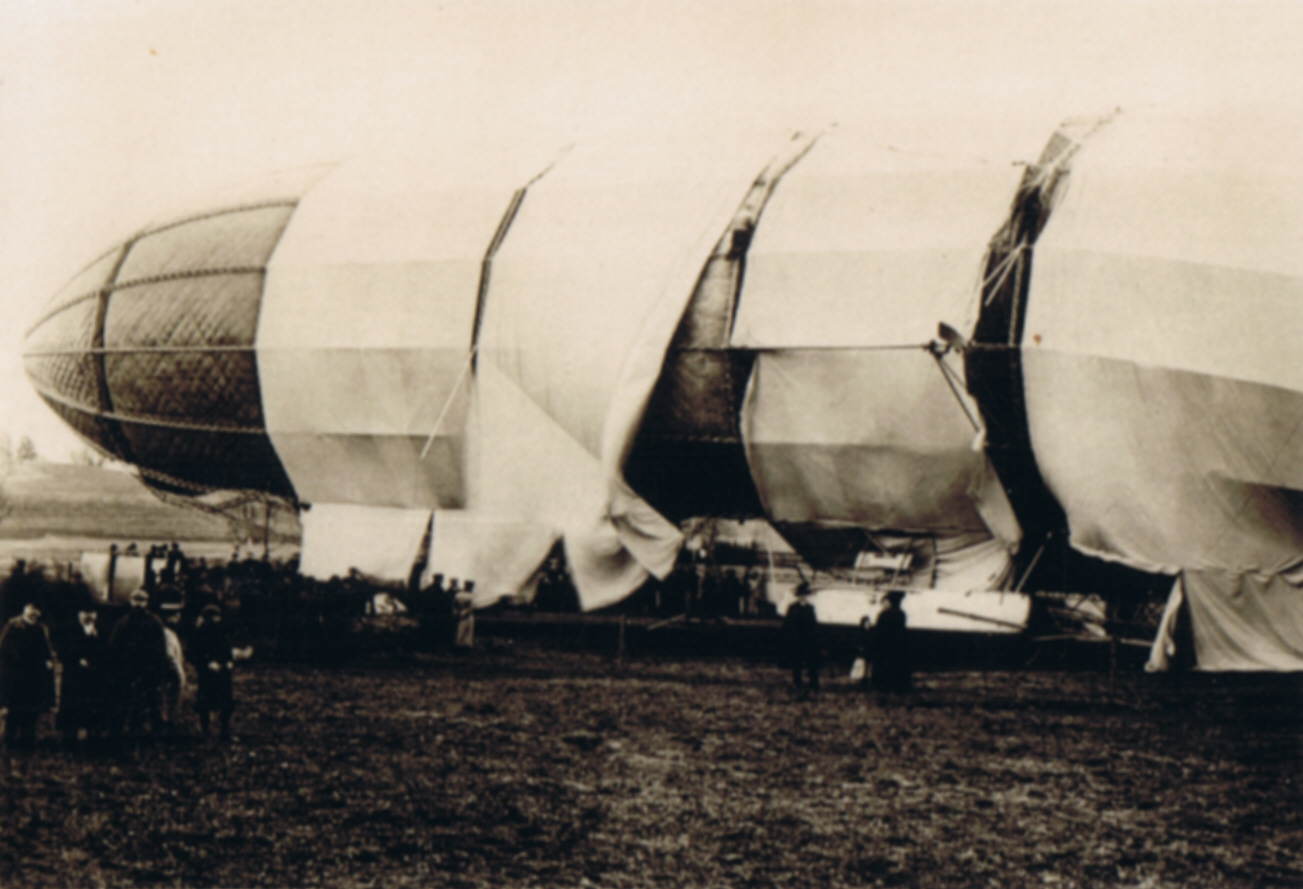 Das zerstörte LZ 2 am 17. Januar 1906 bei Kisslegg